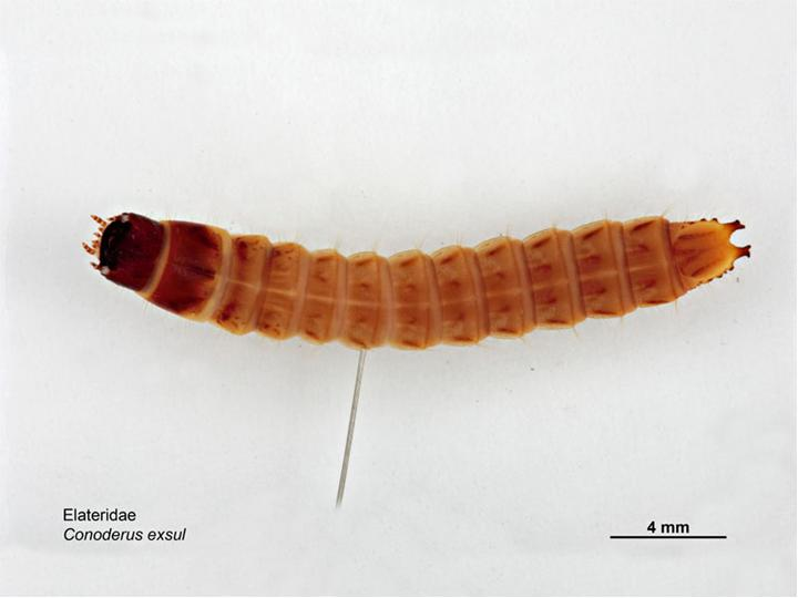 Conoderus exsul, larva.